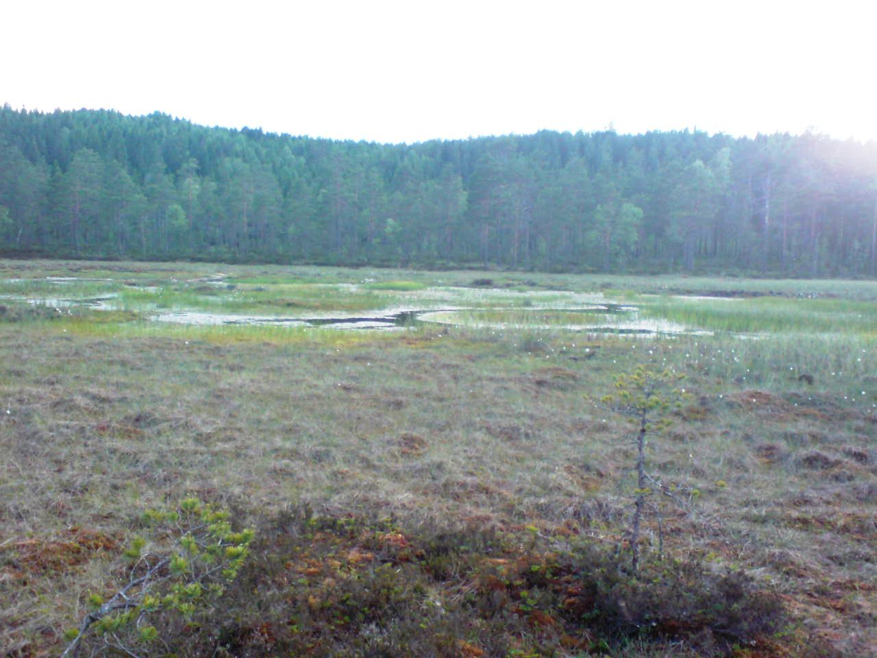 Tretjern på Lierfoss i Aurskog-Høland, sett fra øst.